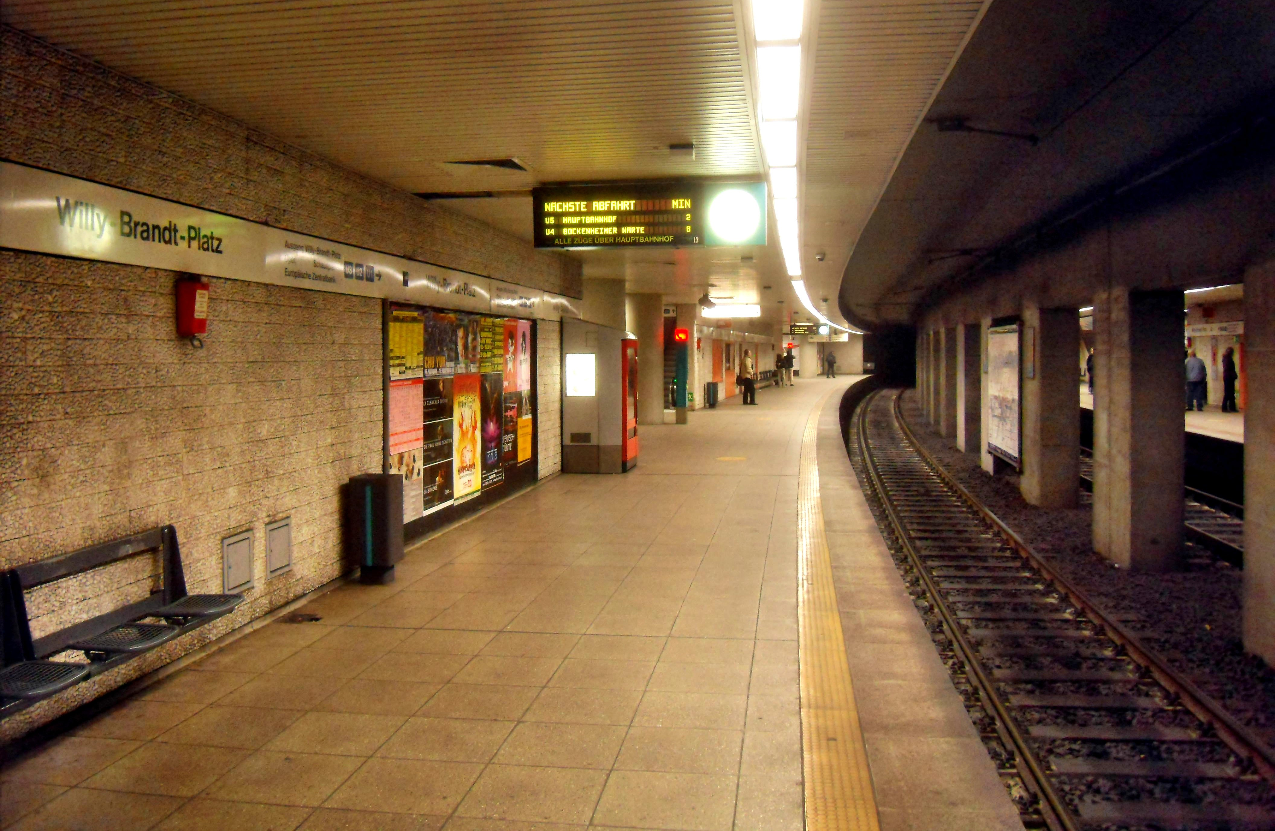 Bahnsteig der D-Ebene des U-Bahnhofs Willy-Brandt-Platz der U-Bahn Frankfurt auf der Linie U 4 und U 5 in Hessen (Deutschland)